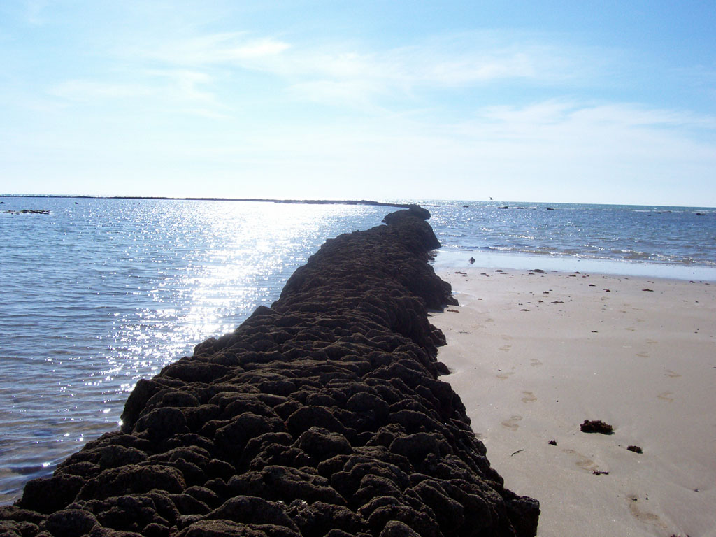 Corral de pesca o de pesquería en la playa de Punta Candor, en Rota-cádiz-Andalucia-España